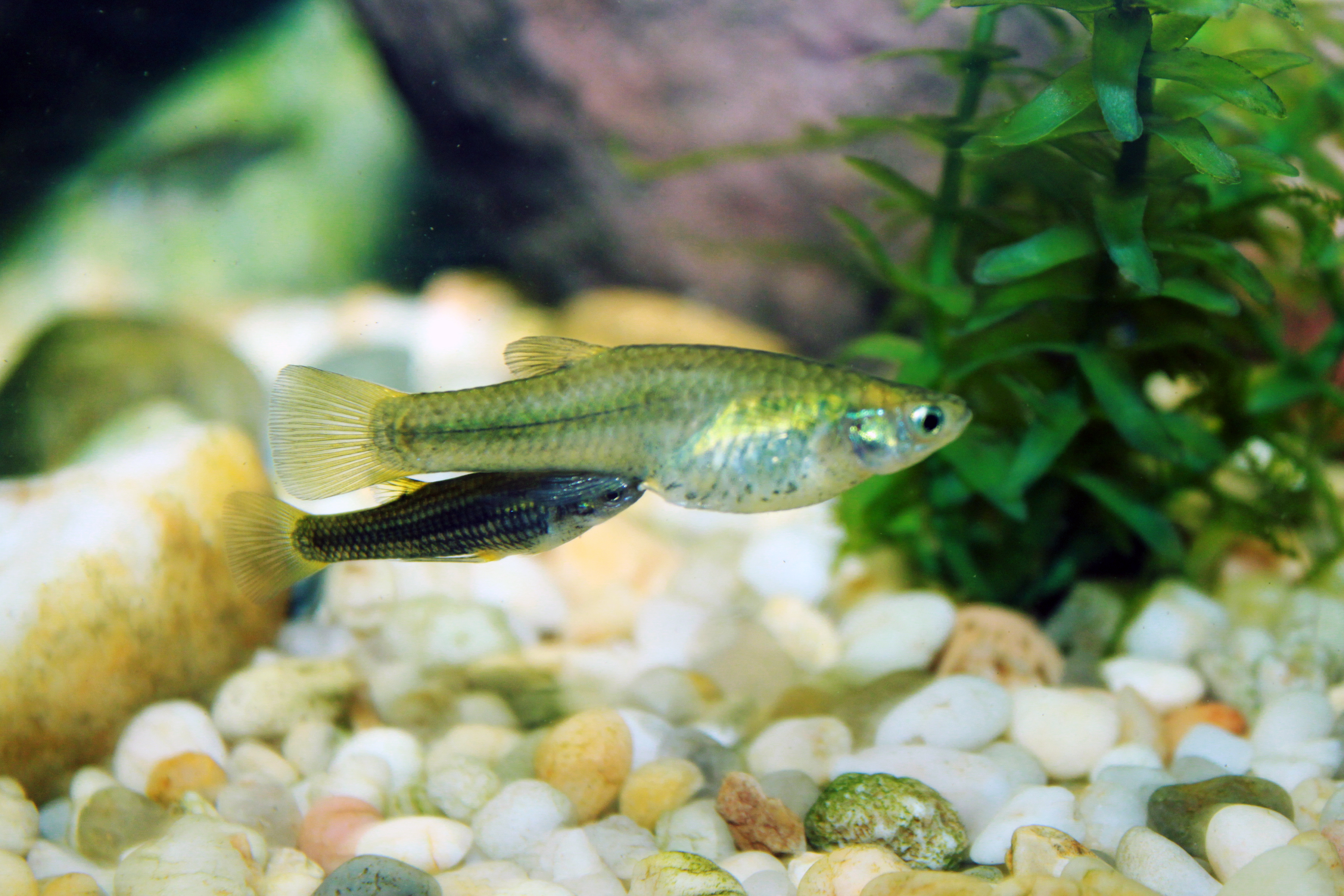 Gila topminnow Poeciliopsis occidentalis